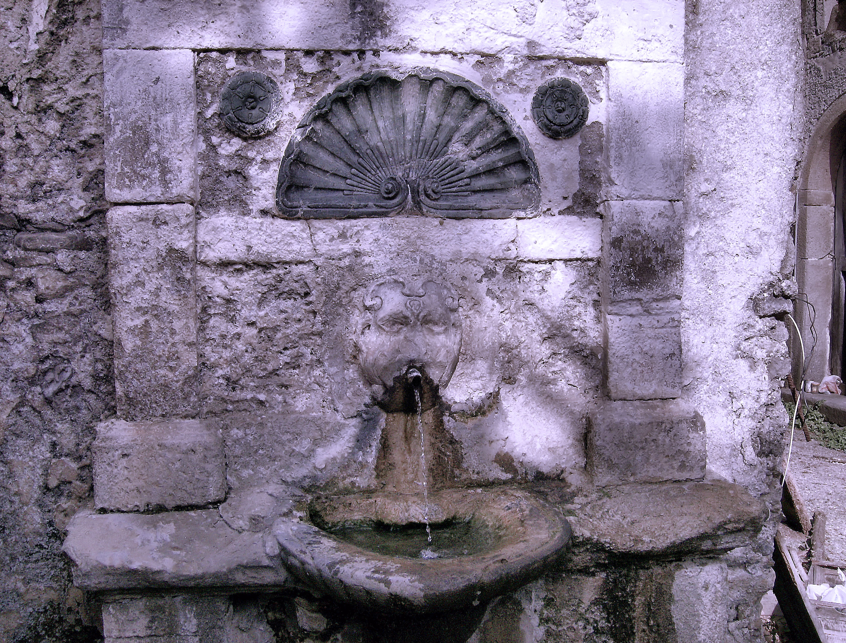 Me Medesimo, scattata oggi in Località Augurato in Campora San Giovanni, raffigurante il Peshcaru della Fontana, cedo, carico e ricarico l'immagine in questione in quanto scattata oggi da me, sotto licenza cc-by-sa. Distintissimi Saluti